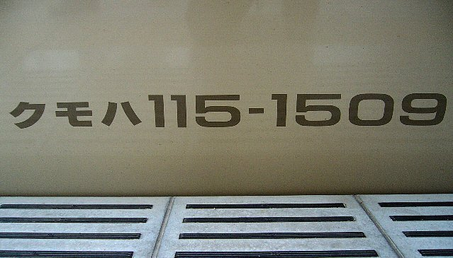 西日本旅客鉄道（JR西日本）が近年採用している車両番号字体 115系